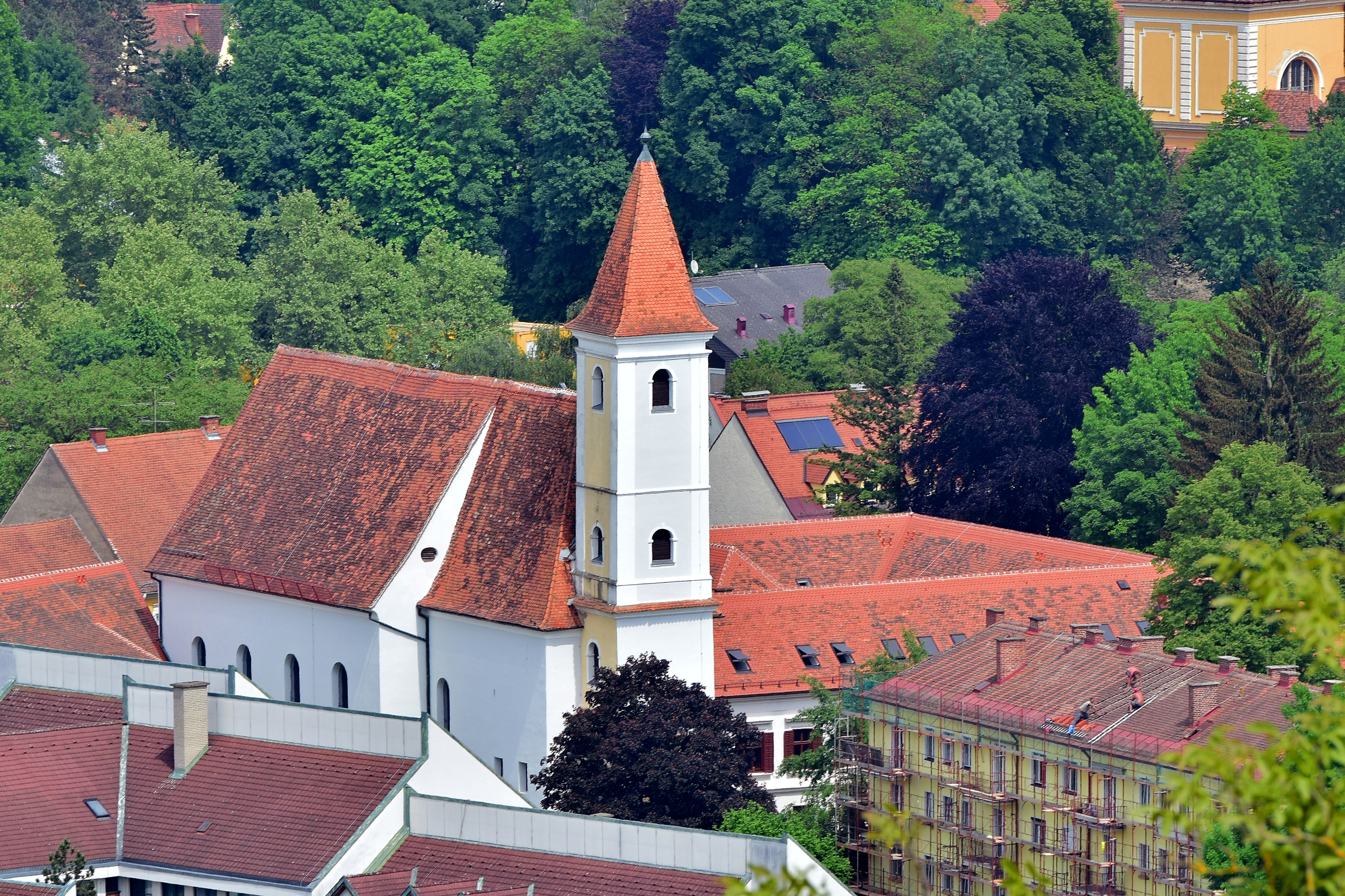 Schule, ehem. Franziskanerkloster